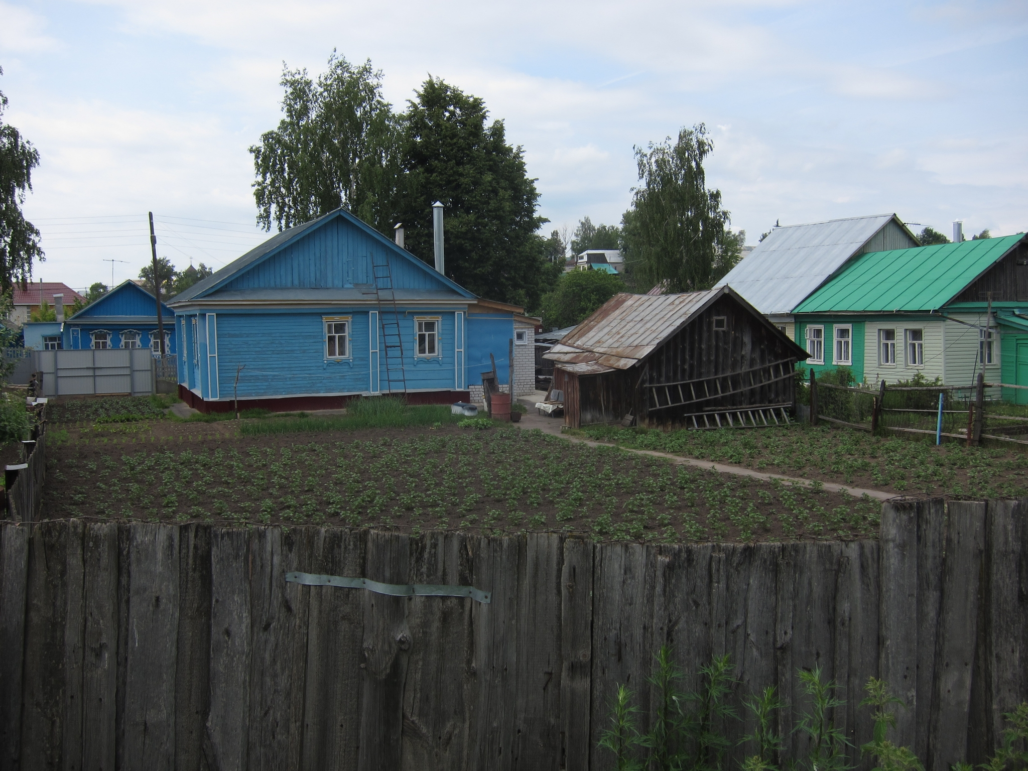 olericulture